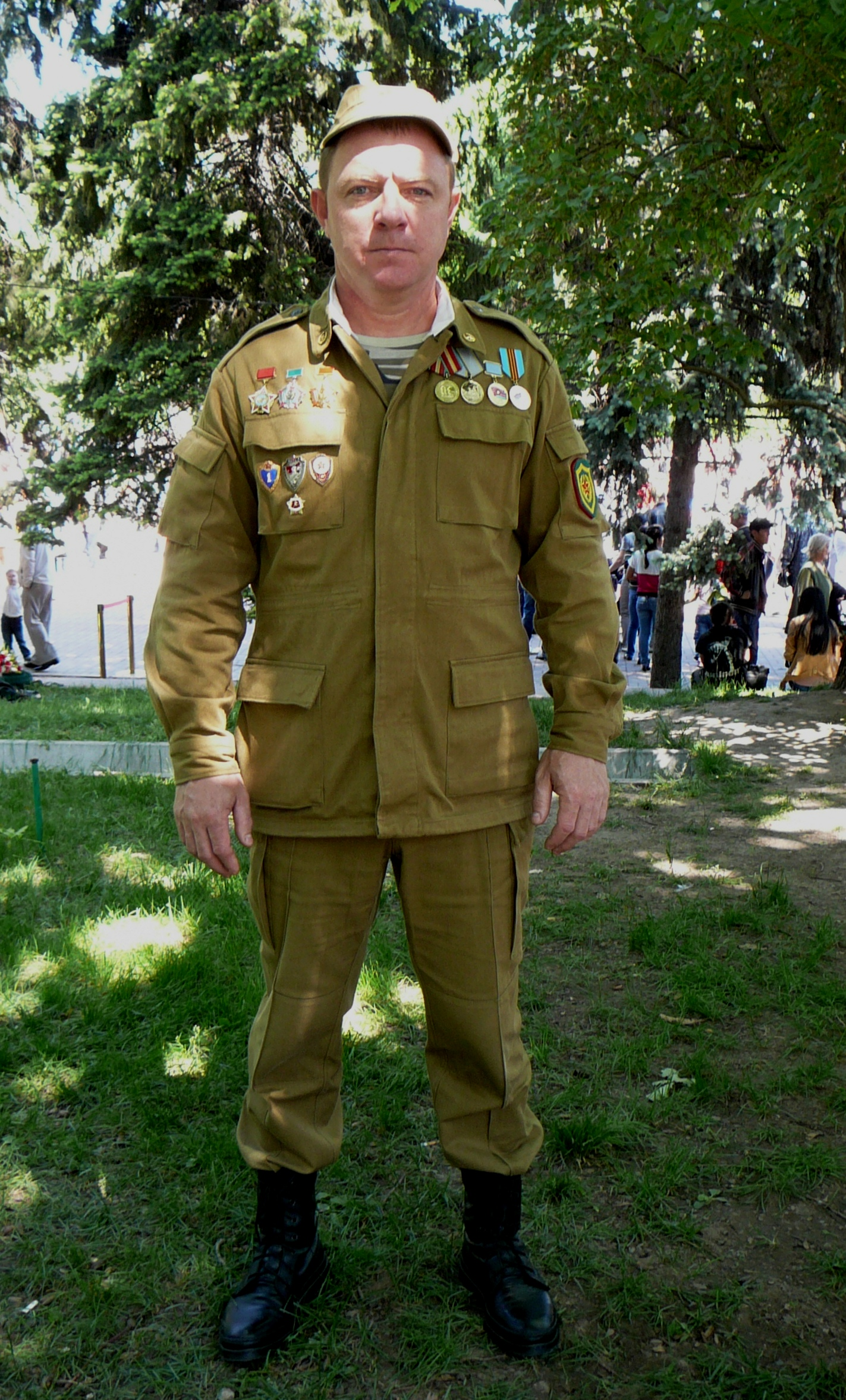 Ветеран Афганской войны в "афганке". Алматы 2012-й год